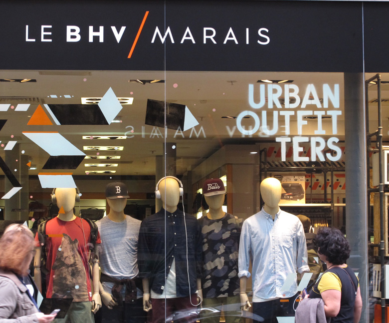 Vitrine d’un magasin parisien.